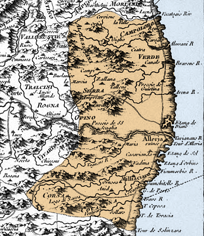 Province d'Alleria (Aléria) - extrait de la Carte de l'isle de Corse de Jacques-Nicolas Bellin, éditée en 1764